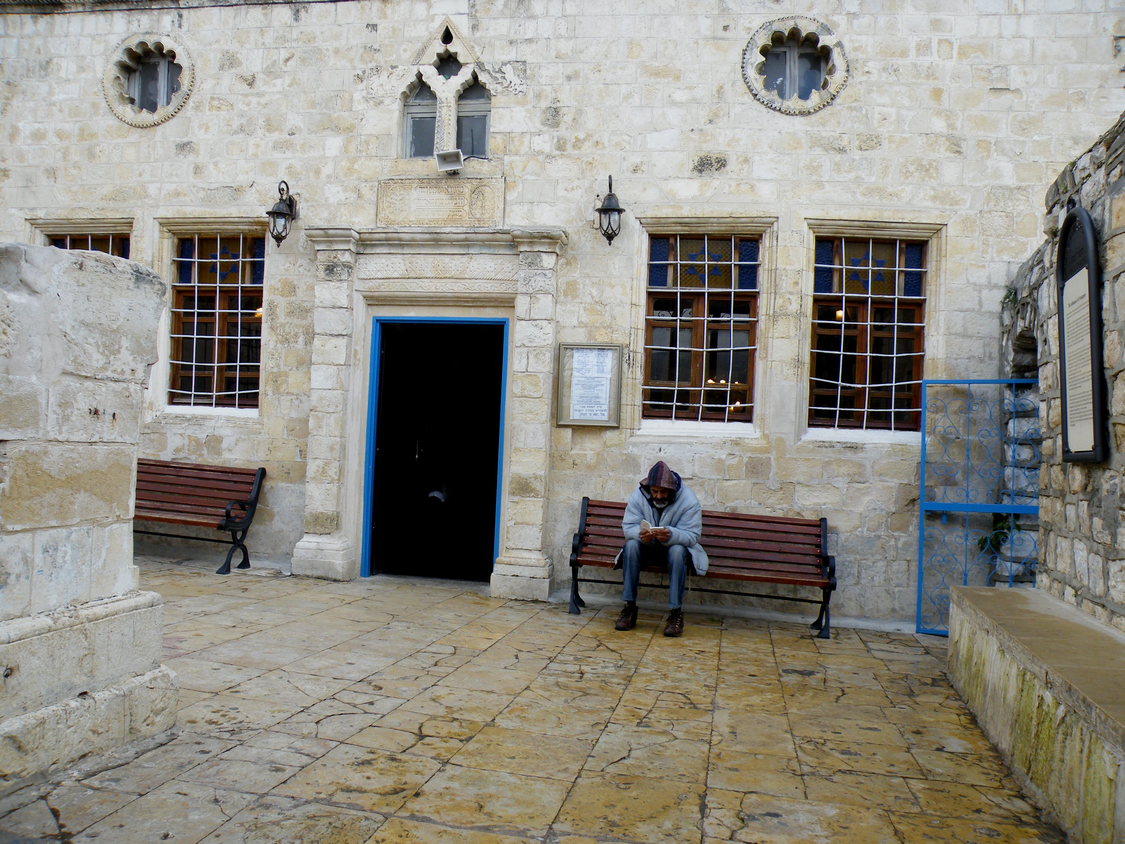 Ari Ashkenazi Synagogue, Safed.